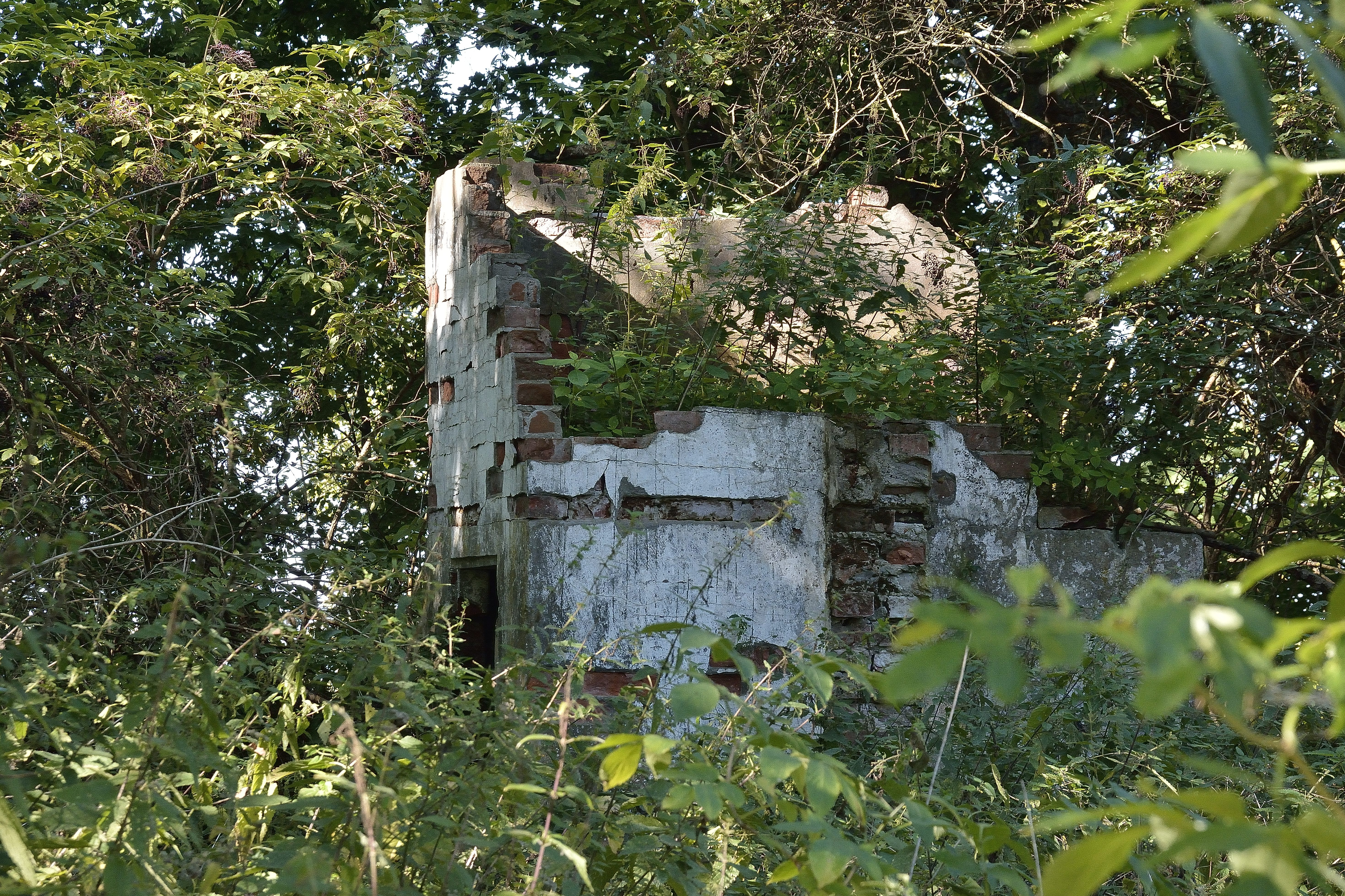 Pozostałosci zabudowań w osadzie Osa.